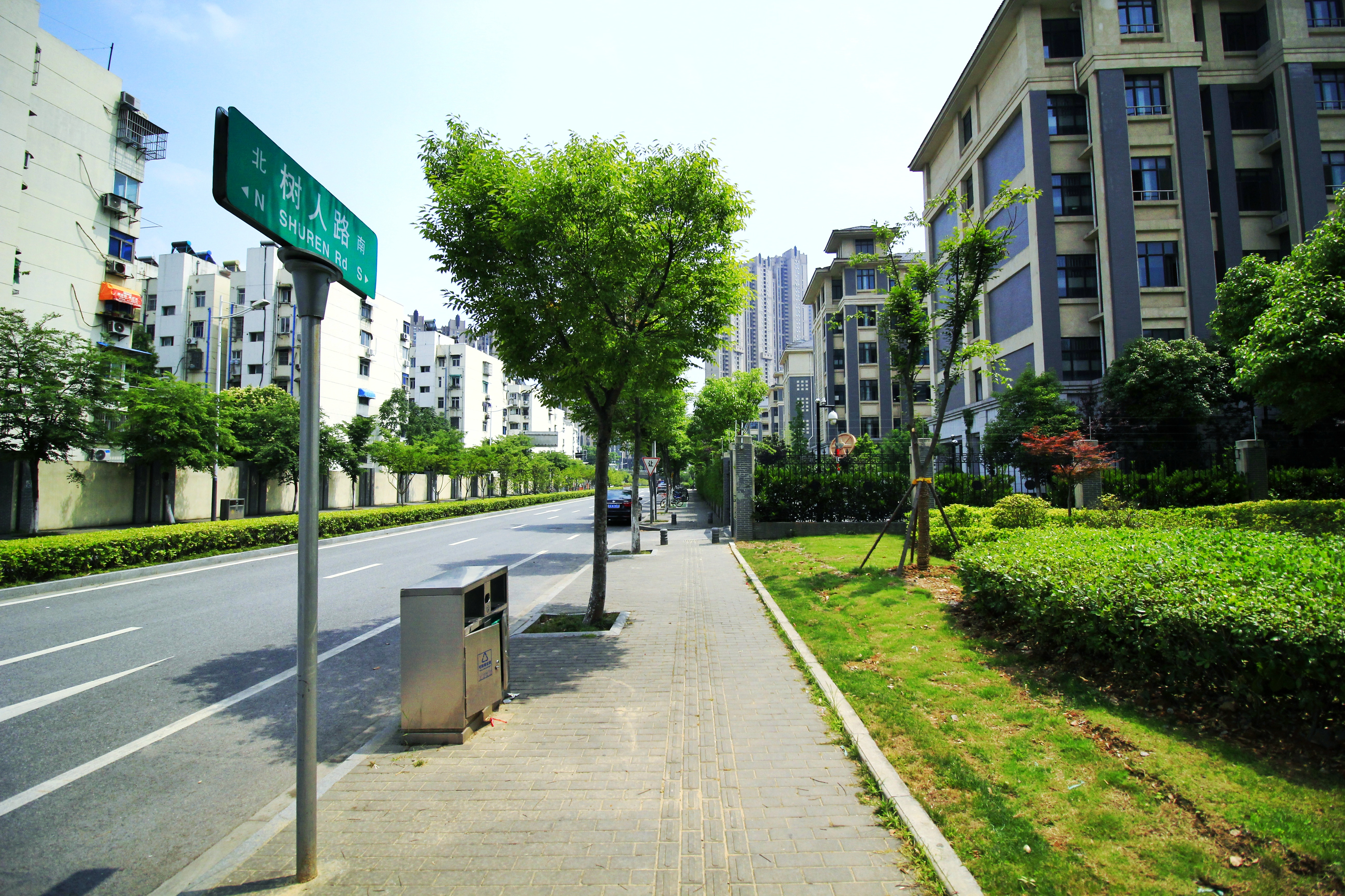 中文（中国大陆）: 树人路，右侧即为南京师范大学附属中学树人学校